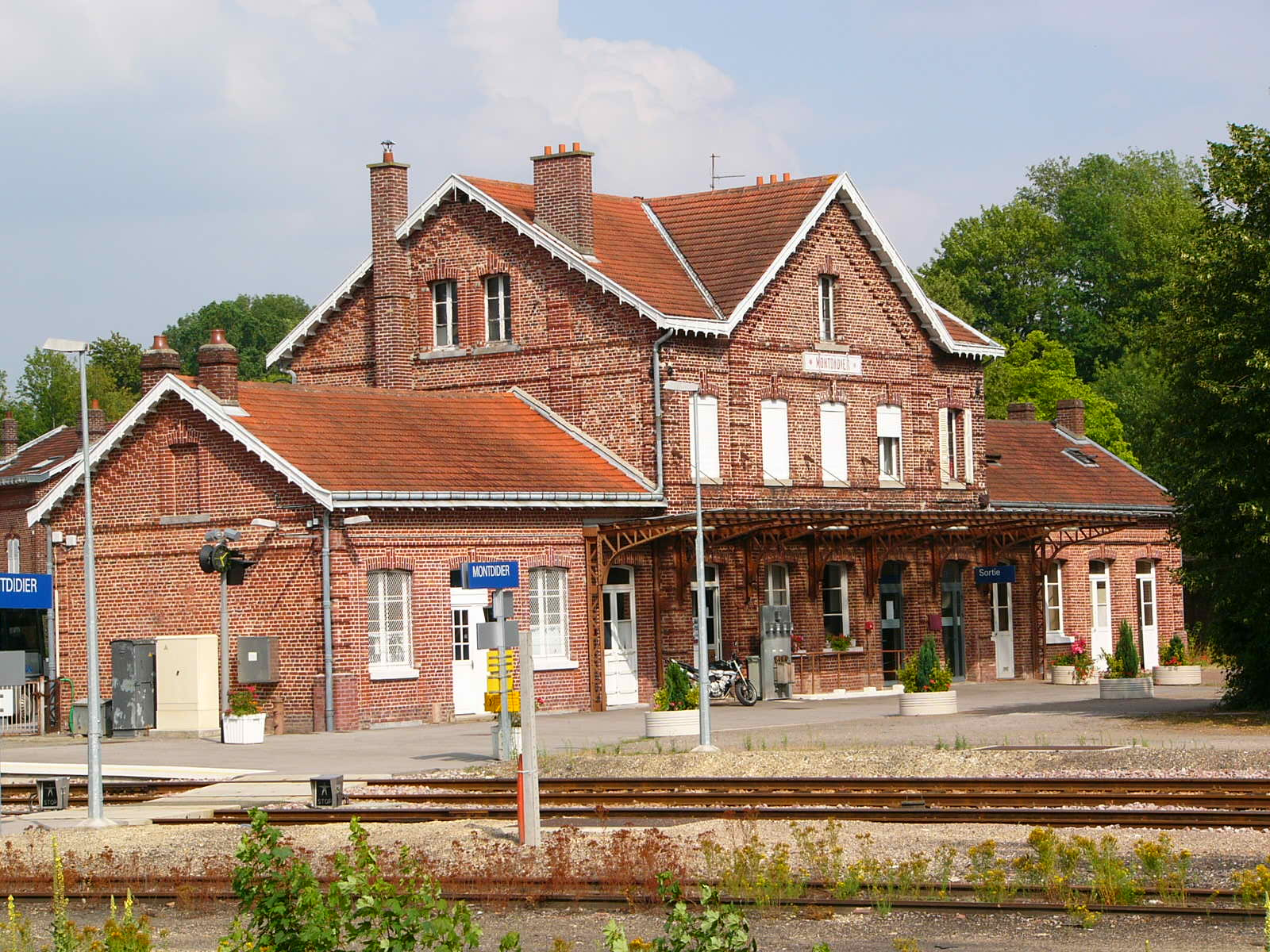 Gare de Montdidier, coté voies (prise au téléobjecif depuis l'ouest de la gare=